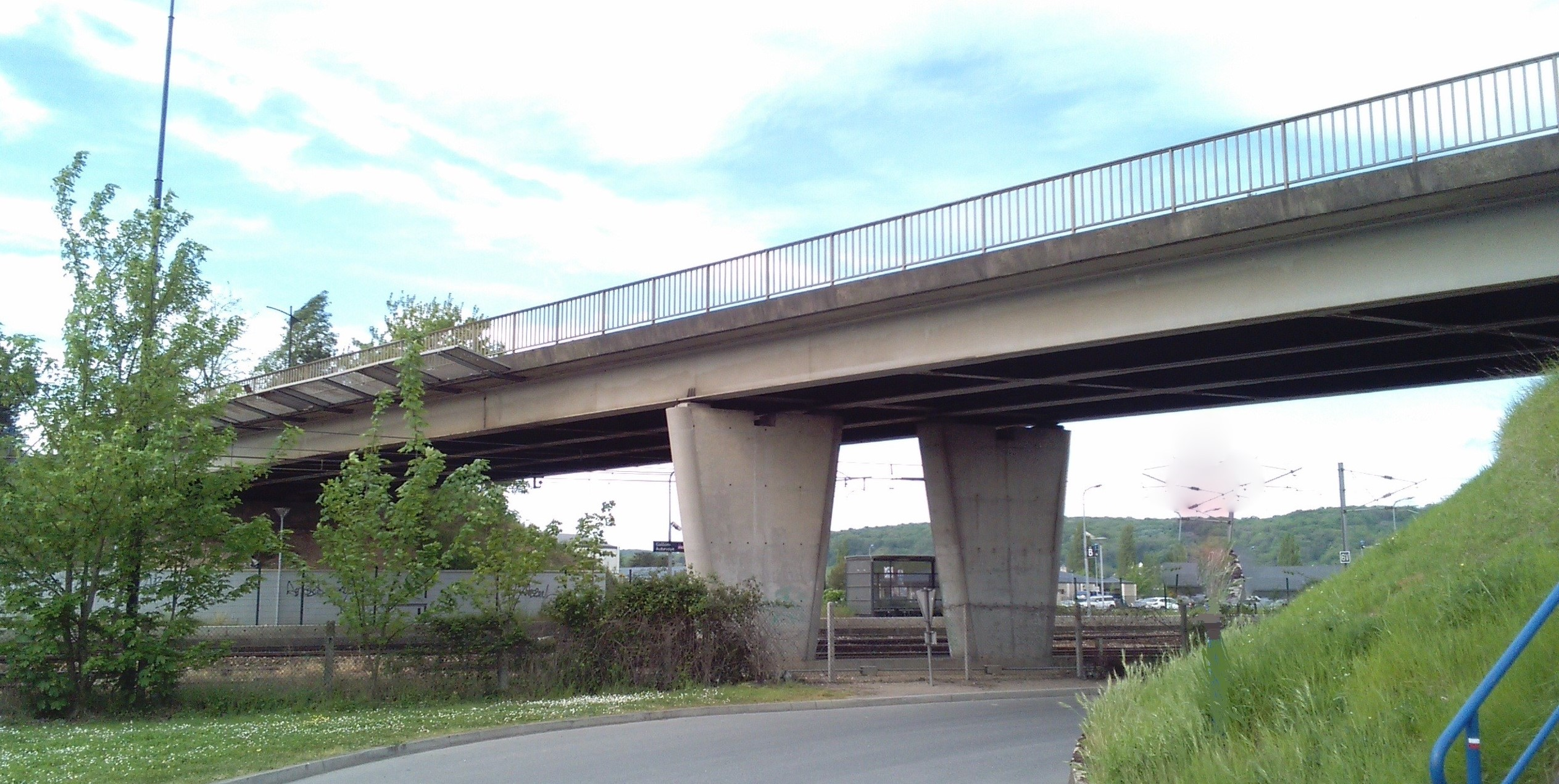 Pont-route RD316 enjambant la ligne Paris-Rouen à hauteur de la gare d'Aubevoye (Eure)